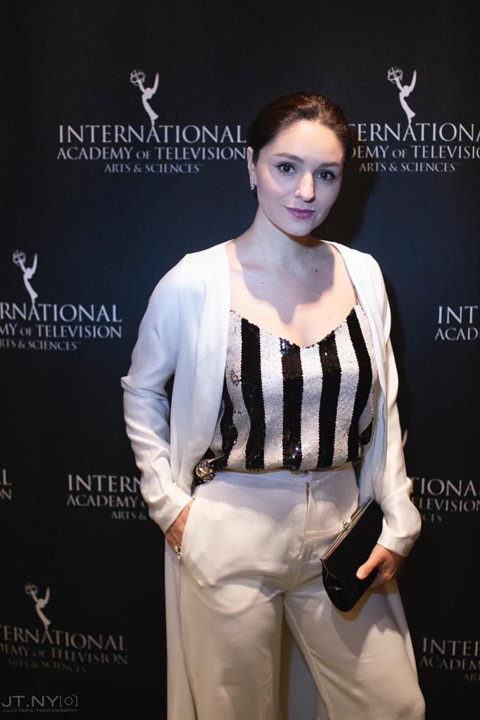 Aporte de imagen hecho por la actriz Nathalia Aragonese, para fines de wikipedia.